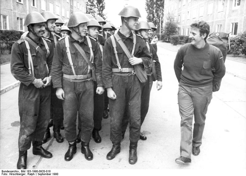 BER-18 / 20.9.90 Bad Salzungen: Neue Uniformen "Made by Bundeswehr" (r.) erhielten die Soldaten in der Mot.-Schützenkaserne Bad Salzungen. Vorerst aber muß die 24teilige Ausrüstung der NVA noch im Schrank bleiben. Die neue Uniform darf erst ab 3.10. getragen werden.